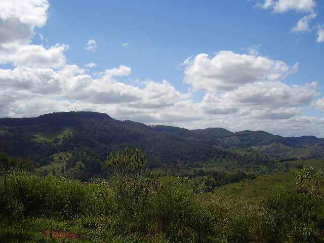 A serra do Cristal esta localizada no município de santo Antônio do Rio Abaixo.